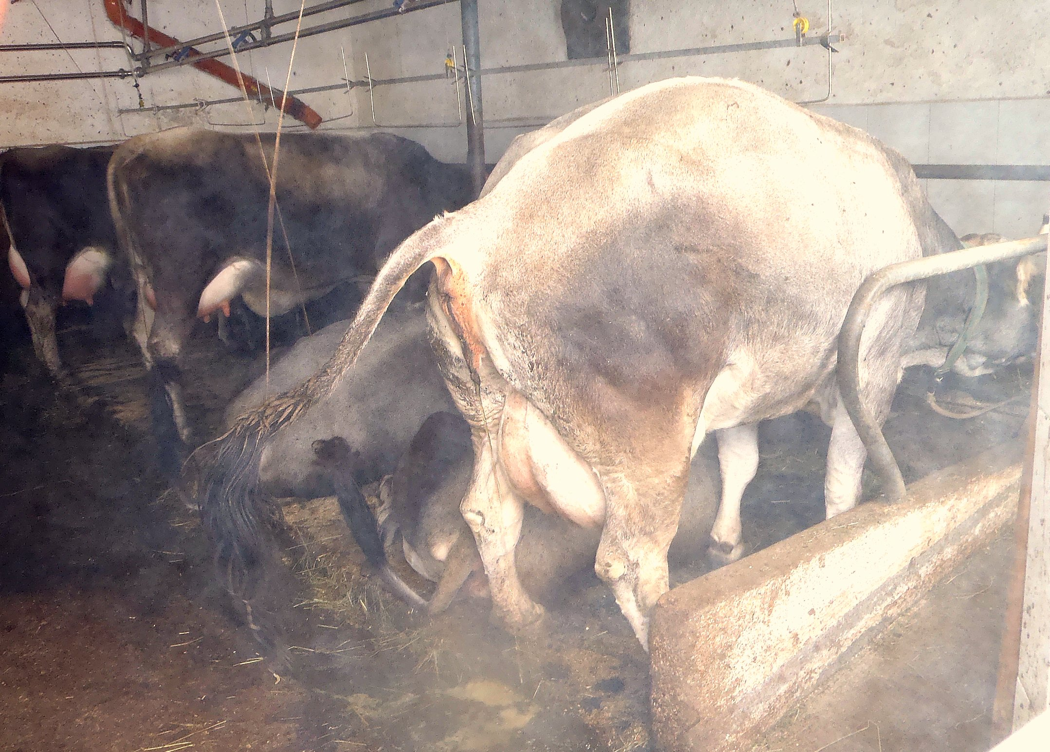 Milchkühe in Anbindehaltung in Südtirol (Italien); über dem Nackenbereich der Tiere sind „Kuhtrainer“ angebracht (temporär, seltener permanent unter Strom stehende Metallbügel, die die Tiere beim Koten/Harnen zum Zurücktreten bis an den Mistkanal zwingen sollen).